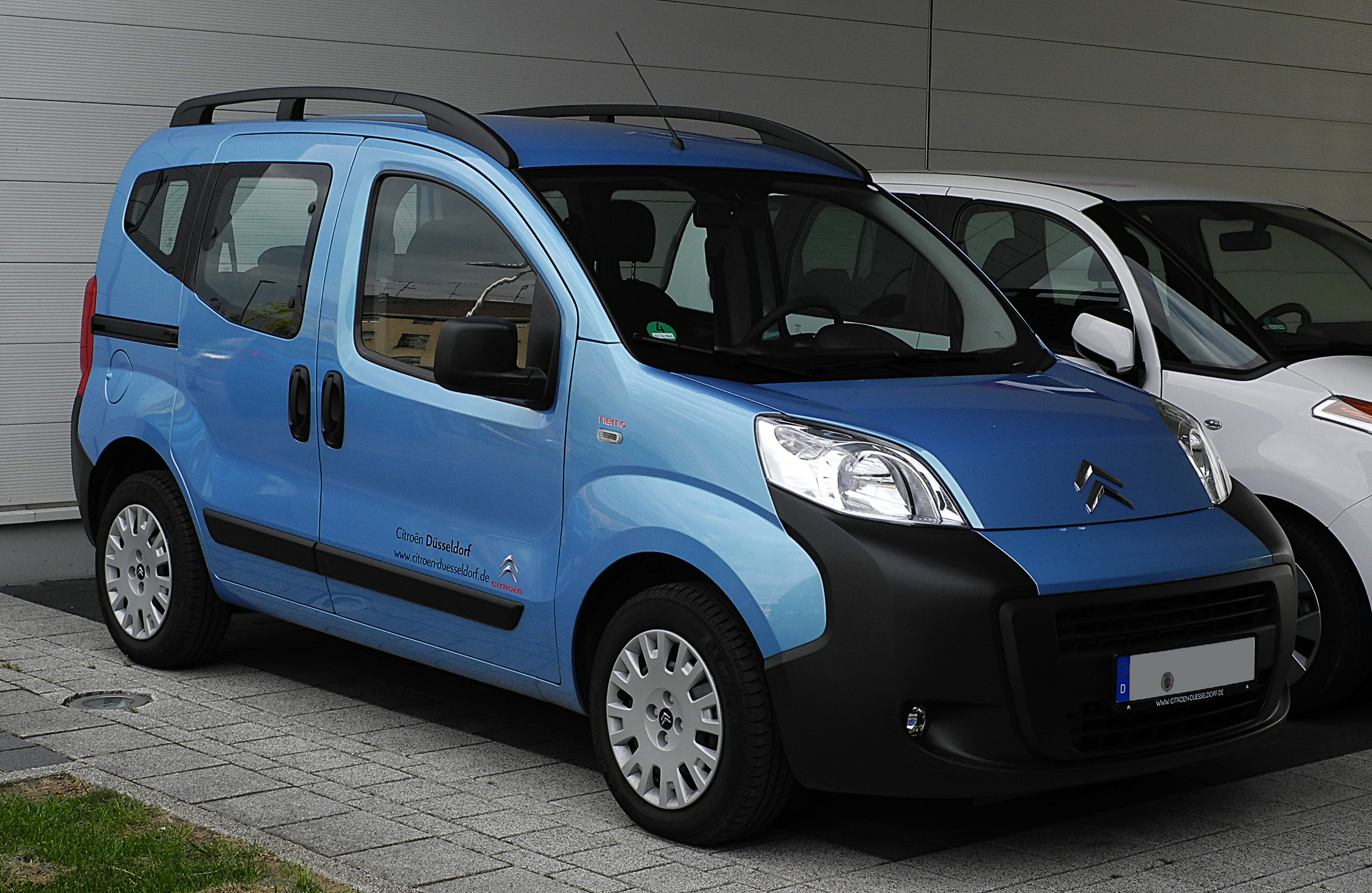 Citroën Nemo Kombi HDi 75 Multispace